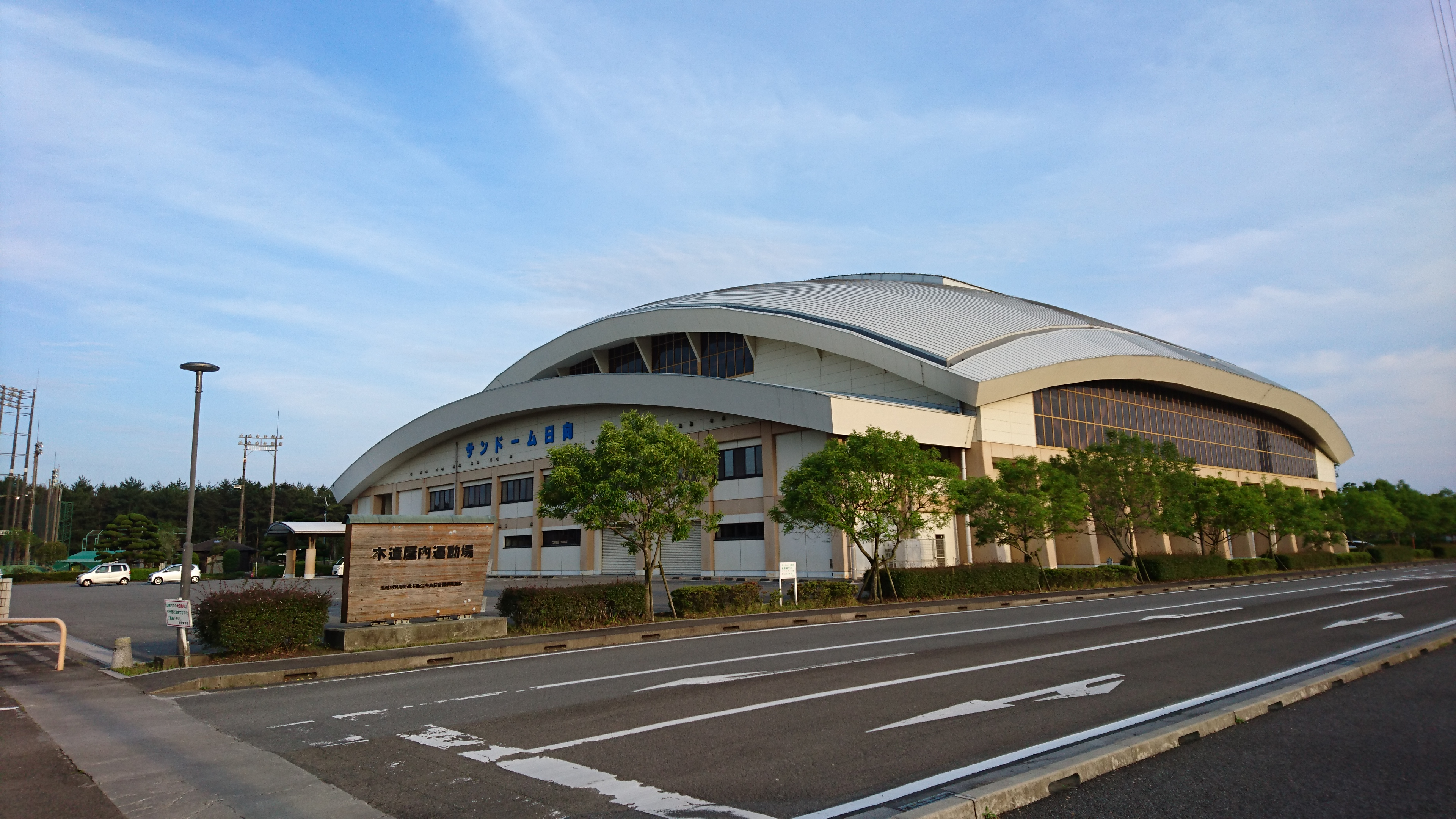 宮崎県日向市財光寺、 お倉ヶ浜総合公園・全天候型運動施設 / 日向市大字財光寺1942番地